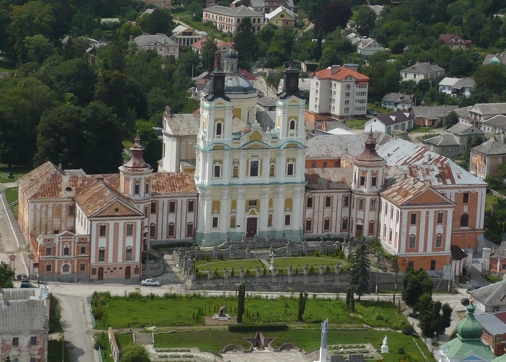 Liceum w Krzemieńcu